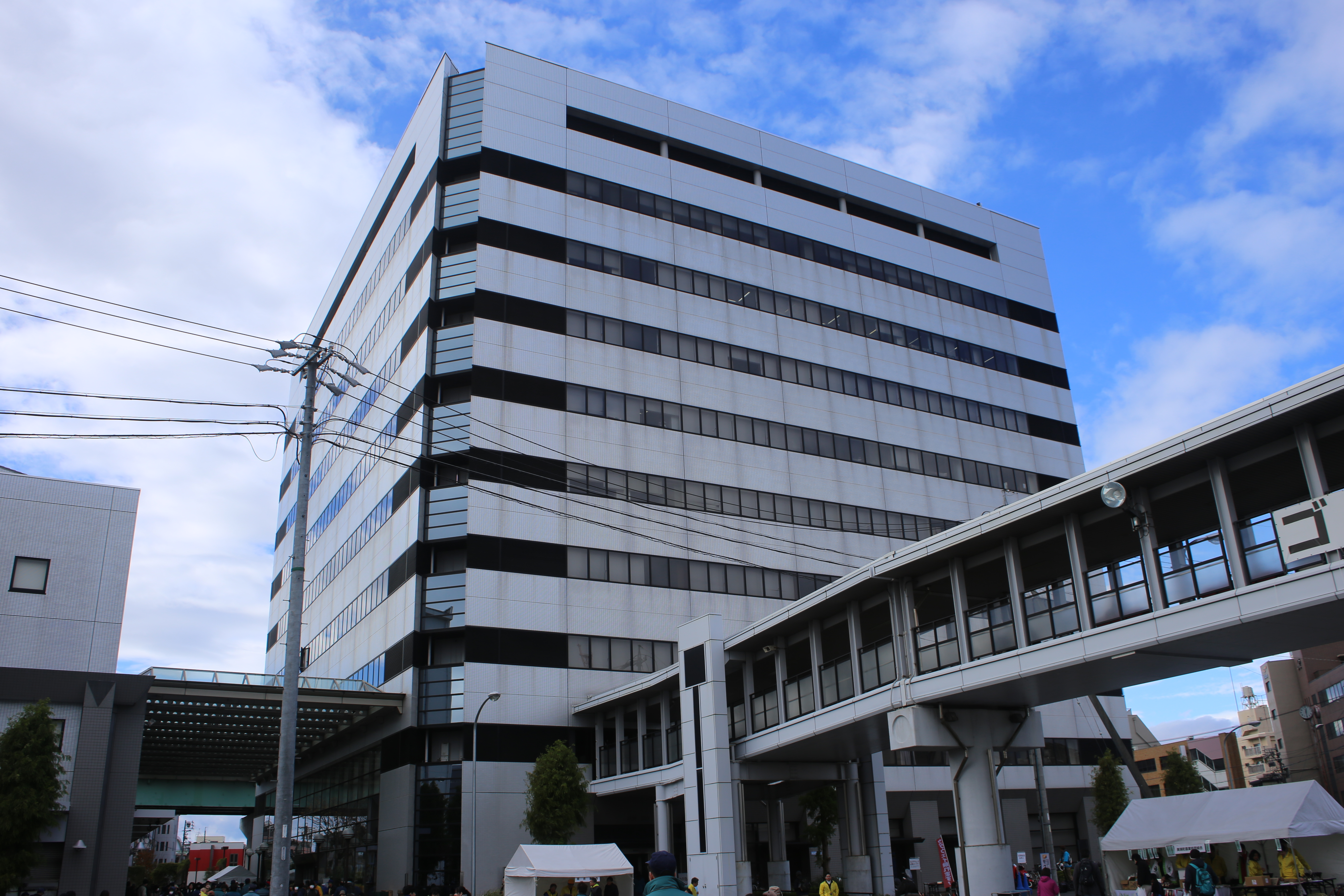 名古屋市熱田区川並町の名古屋市中央卸売市場本場